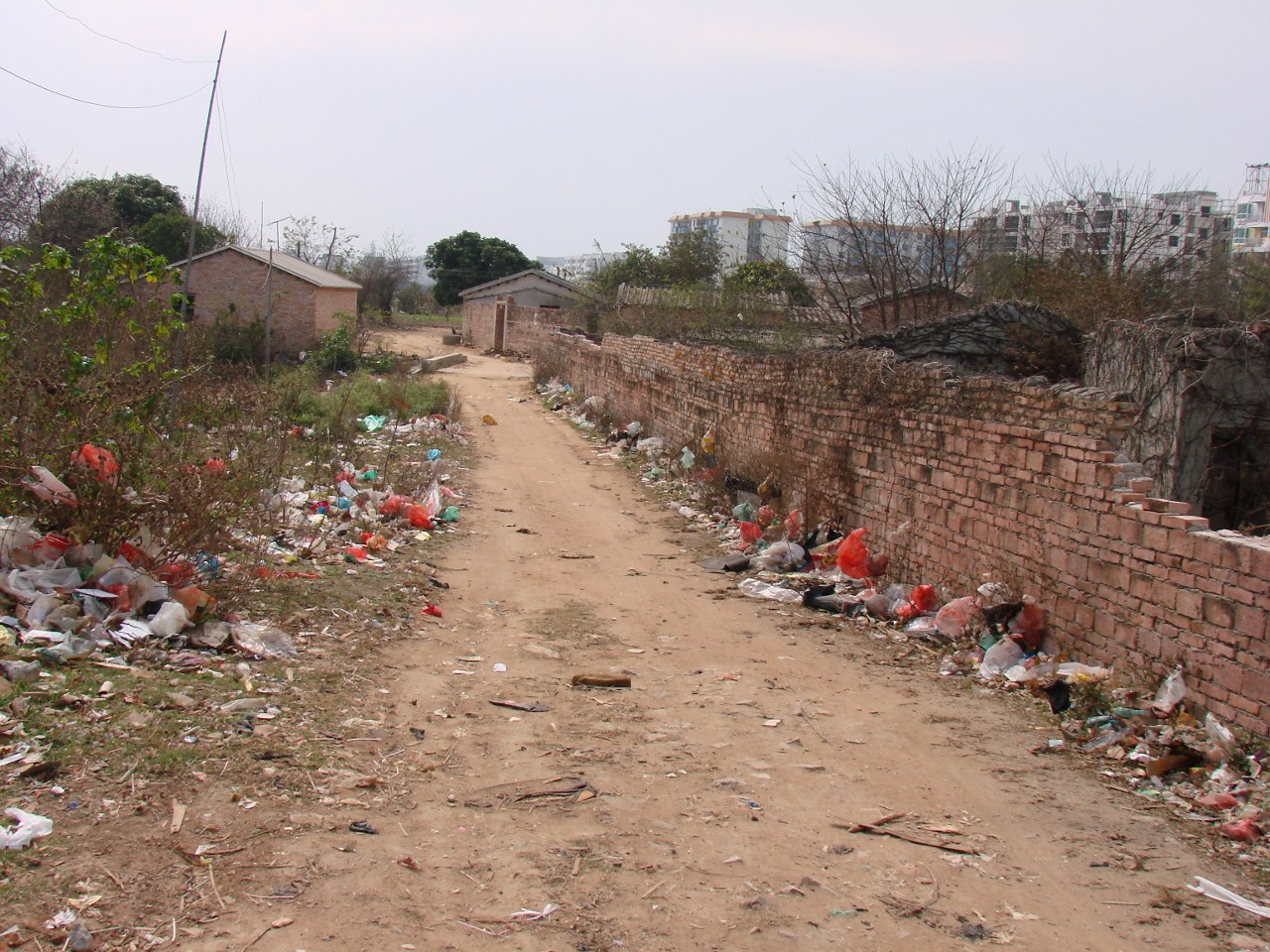 Pollution à Beihai une semaine après le nouvel an chinois